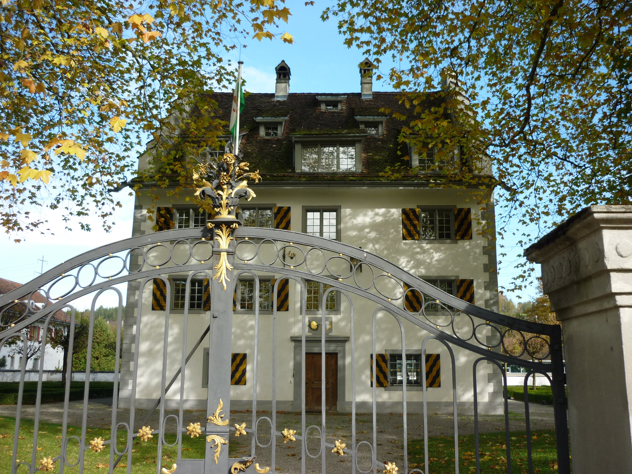 Schloss Knonau ZH, Schweiz